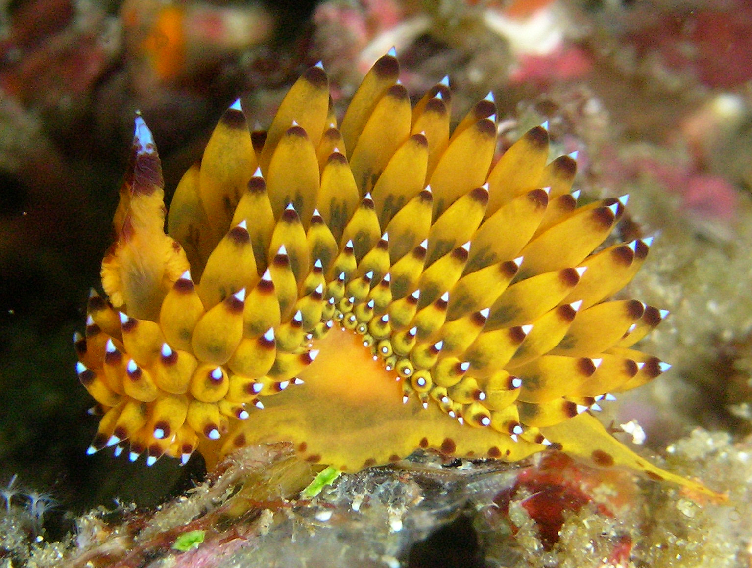 Janolus savinkini Martynov & Korshunova, 2012